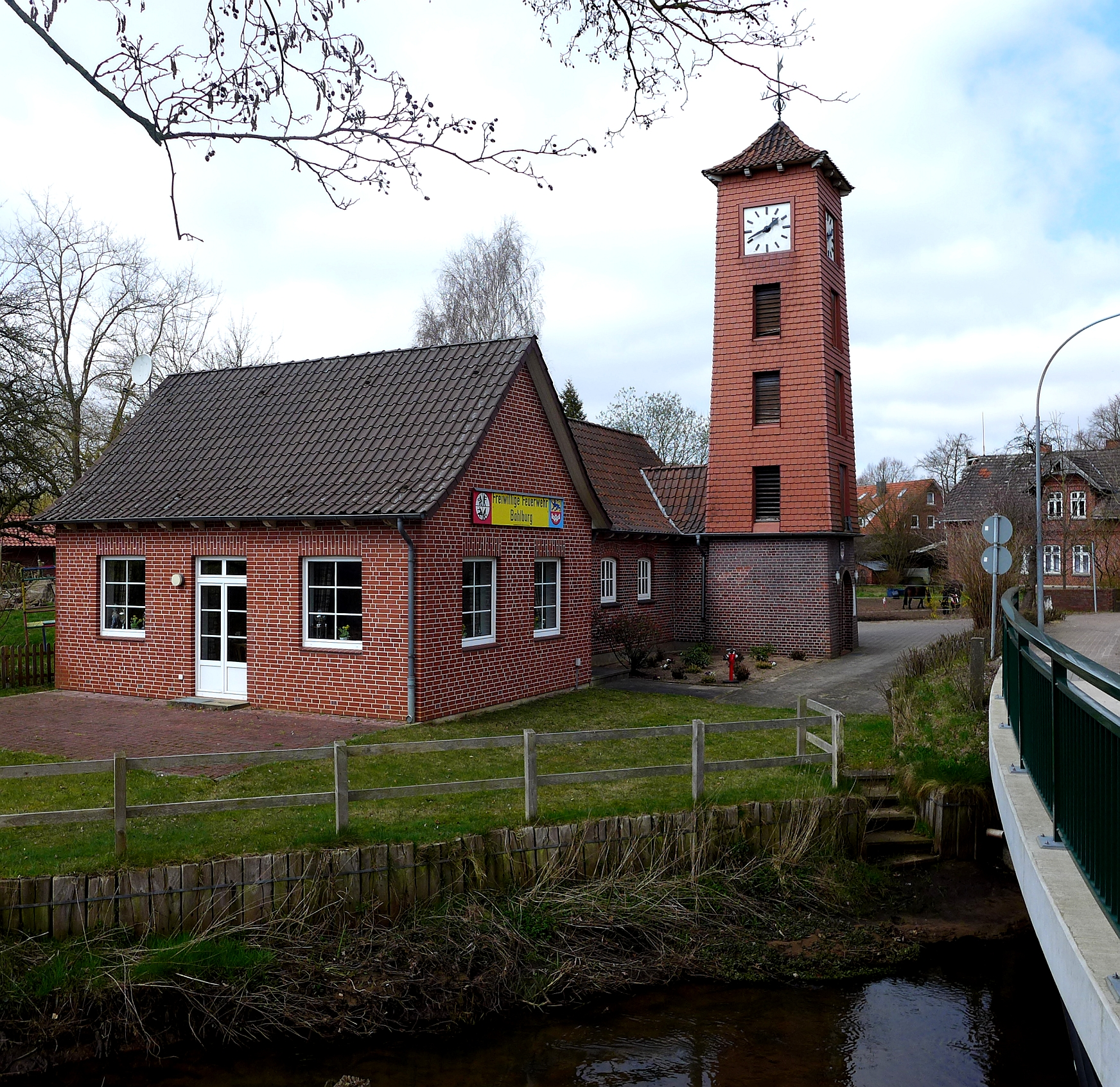 Freiwillige Feuerwehr, Gerätehaus und Schlauchturm. Bahlburg, Ortsteil von Winsen (Luhe).